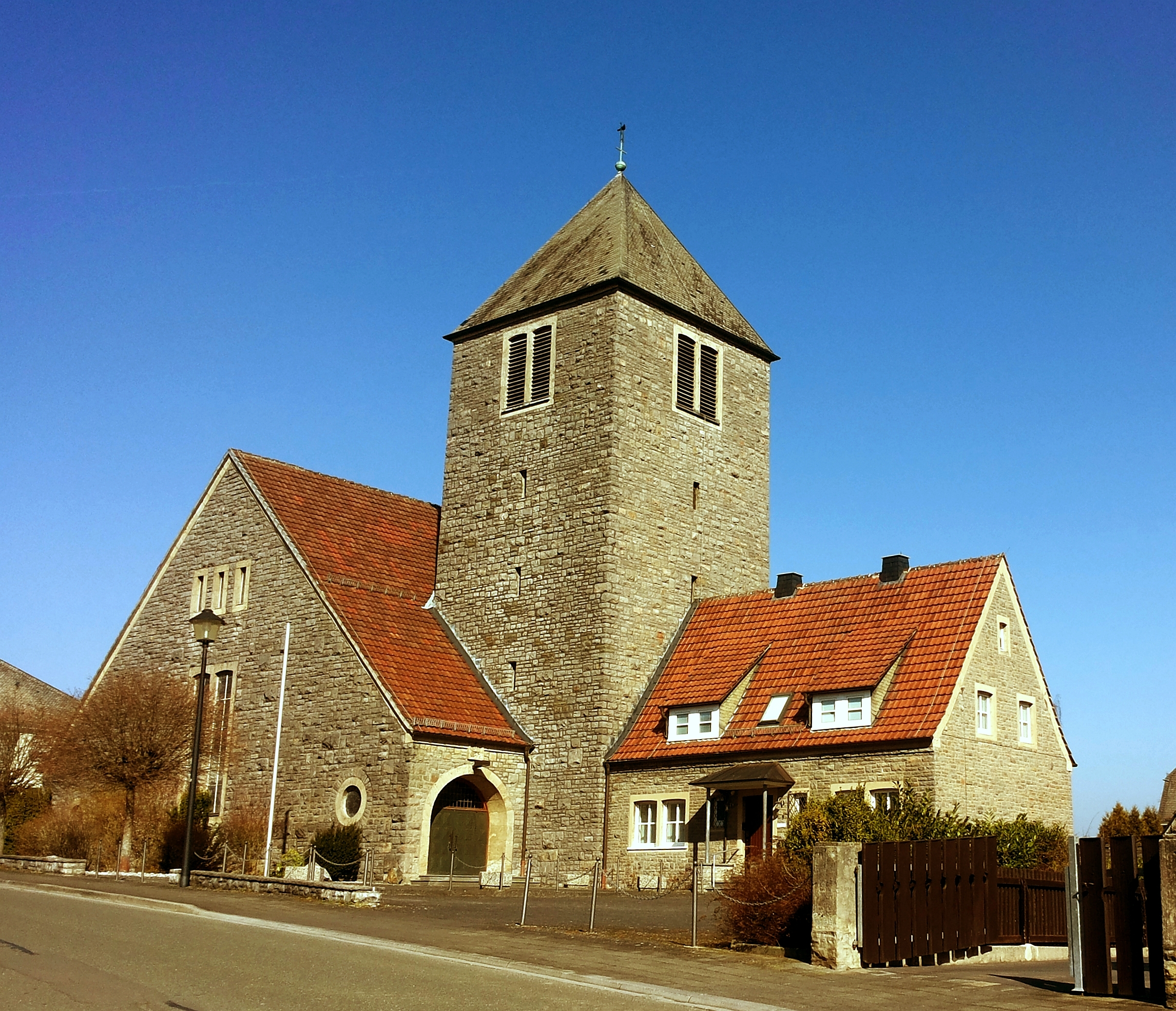 kath. Pfarrkirche Christkönig in Marsberg-Bredelar(Germany)